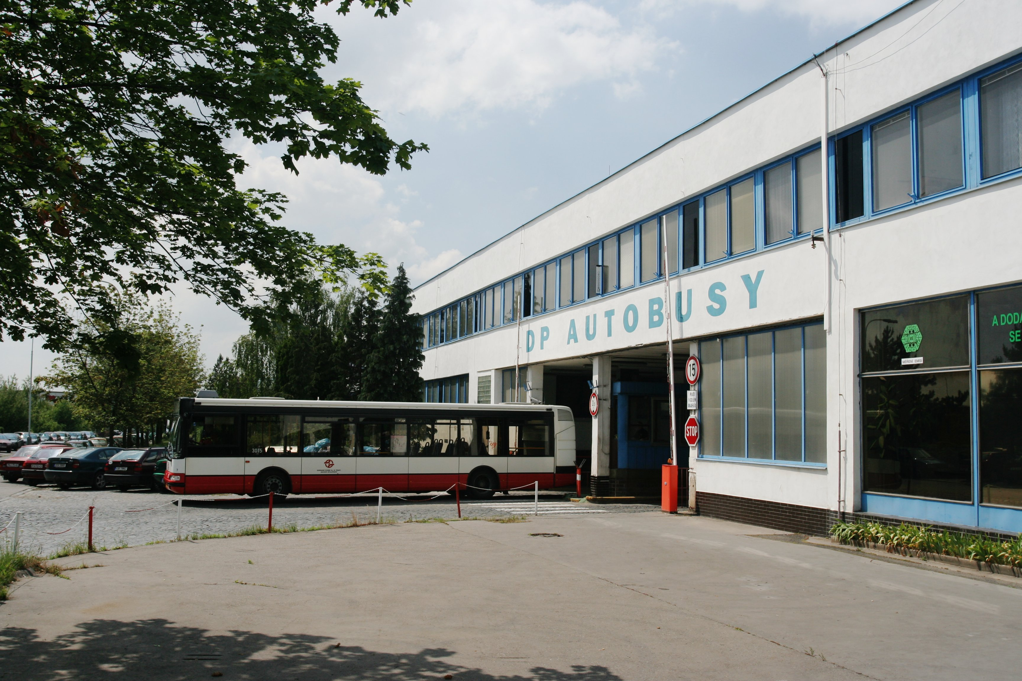 Garáže Řepy